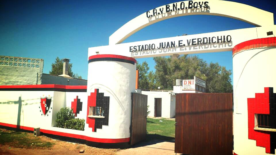 Entrada del Estadio Juan E. Verdichio.